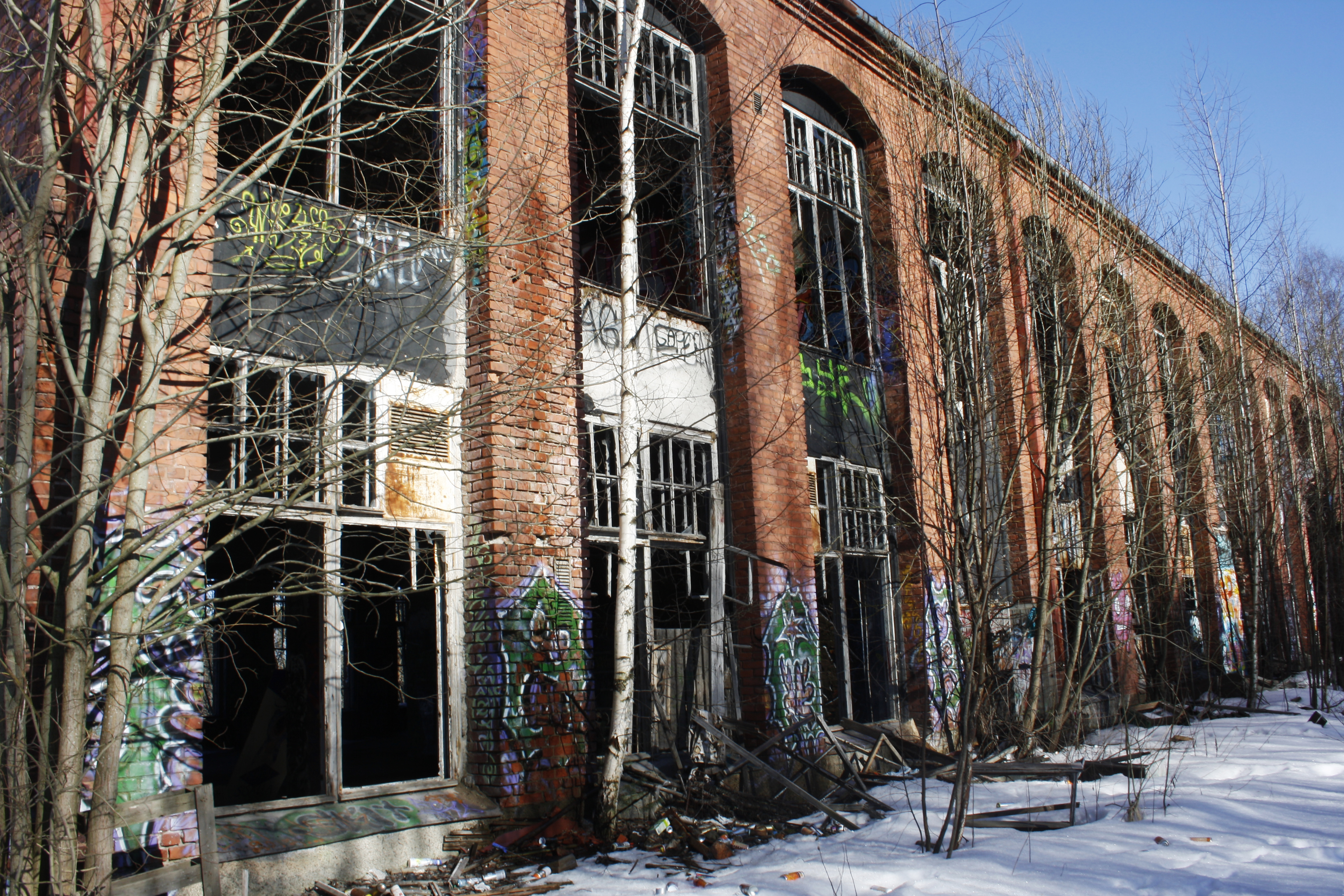 OTKn Tulitikkutehdas_Heli Rekunen